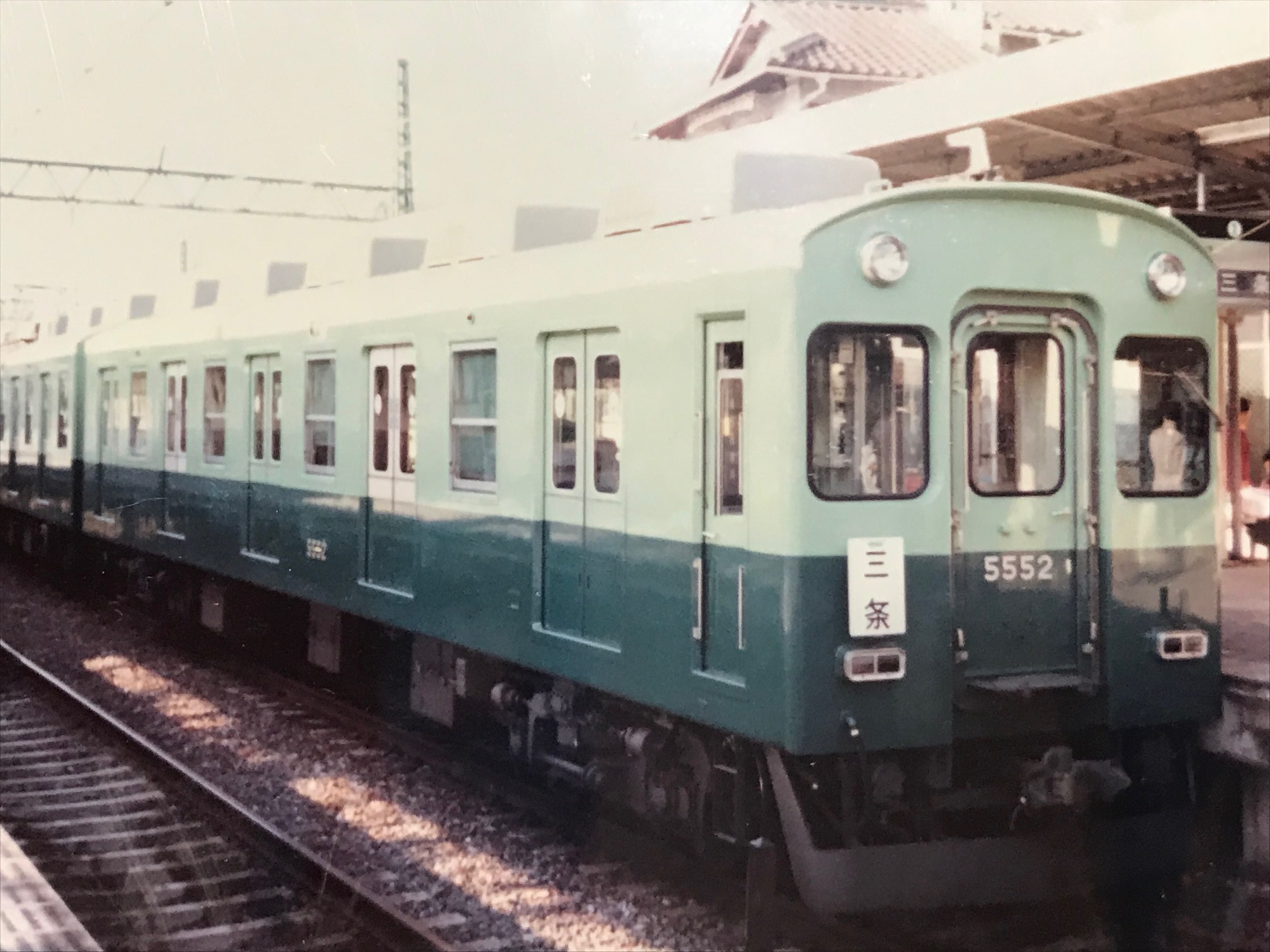 京阪5000系宇治